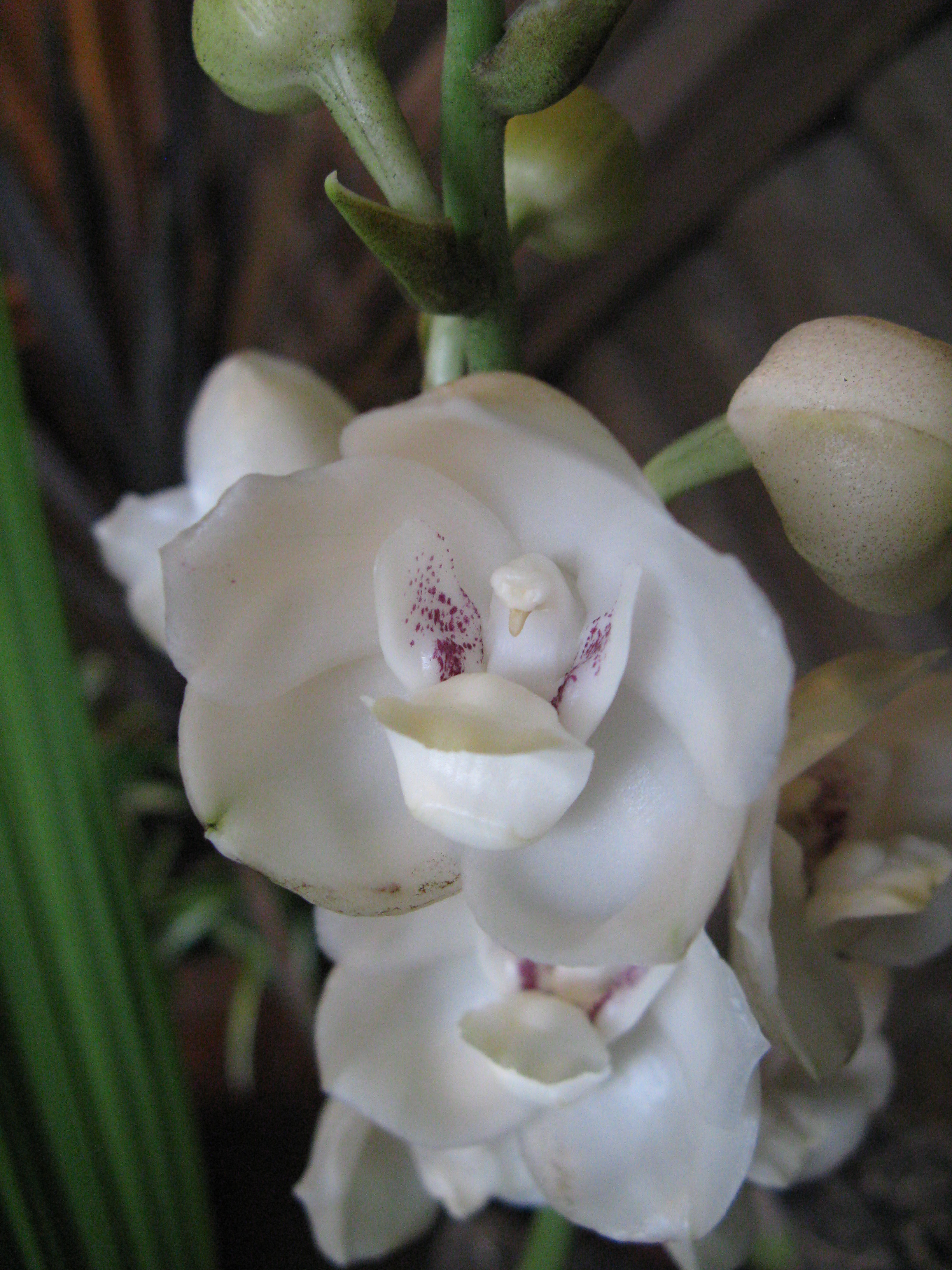 Peristeria elata Place:Osaka Prefectural Flower Garden,Osaka,Japan